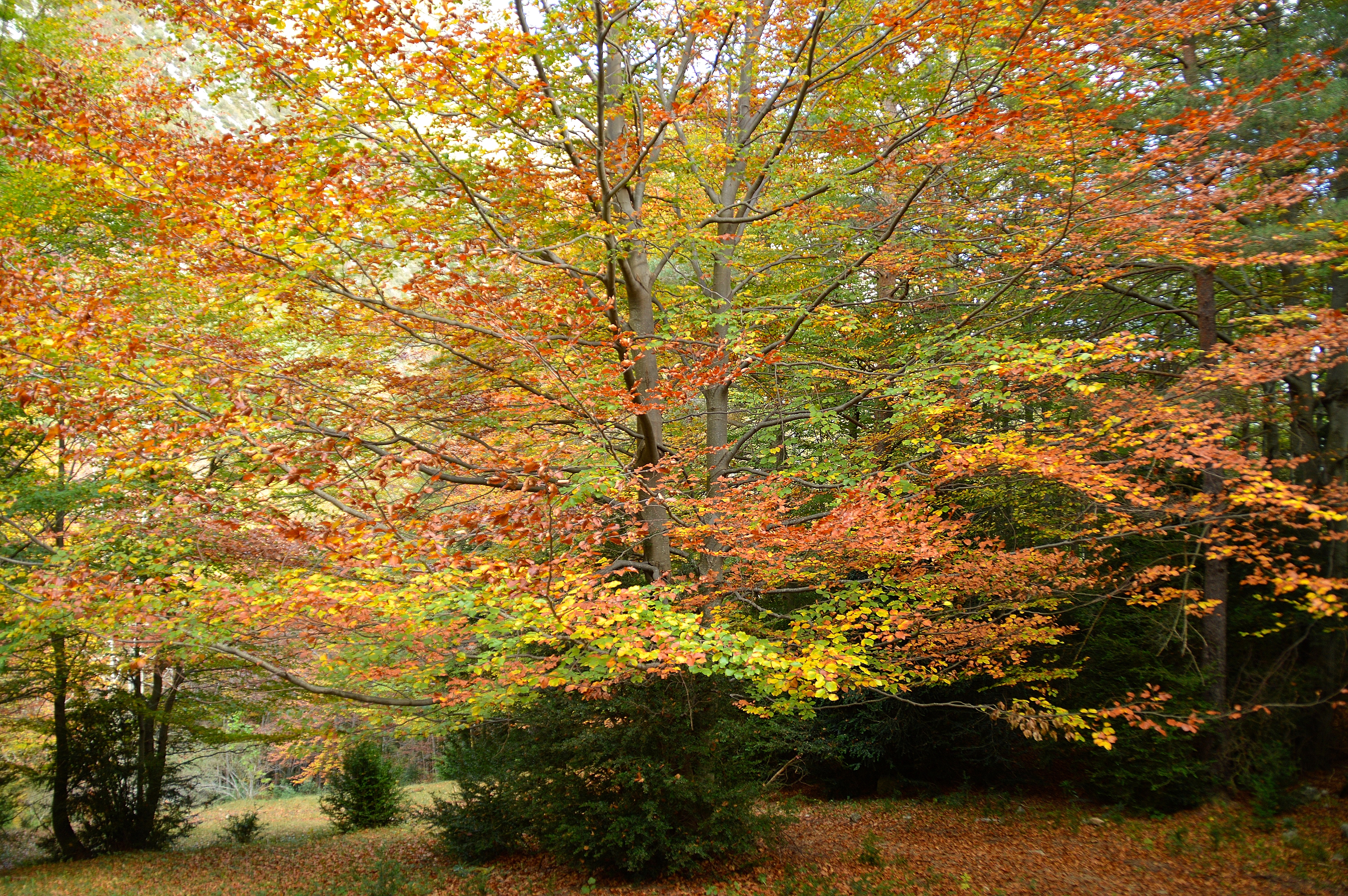 Faig a les Molleres de Gresolet, Parc Natural Cadí-Moixeró, municipi de Saldes, Prepirineu Central català This is a photography of a Special Area of Conservation in Spain with the ID: ES0000018. Natura2000 entry, EEA entry